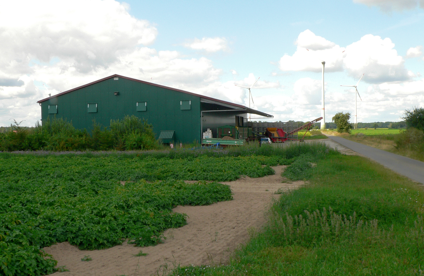 Linienbandkeramische Siedlung Niedernstöcken, frühere Fundstelle, auf der eine Halle errichtet wurde.